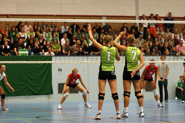 foto publiek